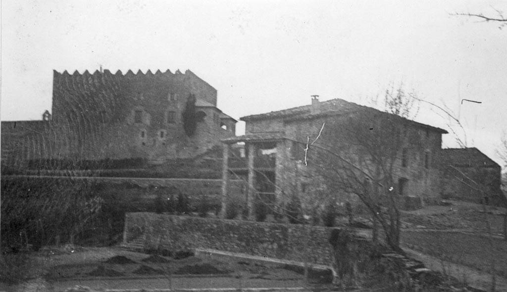 Vista general del Castell de Montesquiu. Cèsar August Torras i Ferreri (Entre 1890 i 1923)